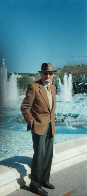 René Étiemble à Nice en 1998